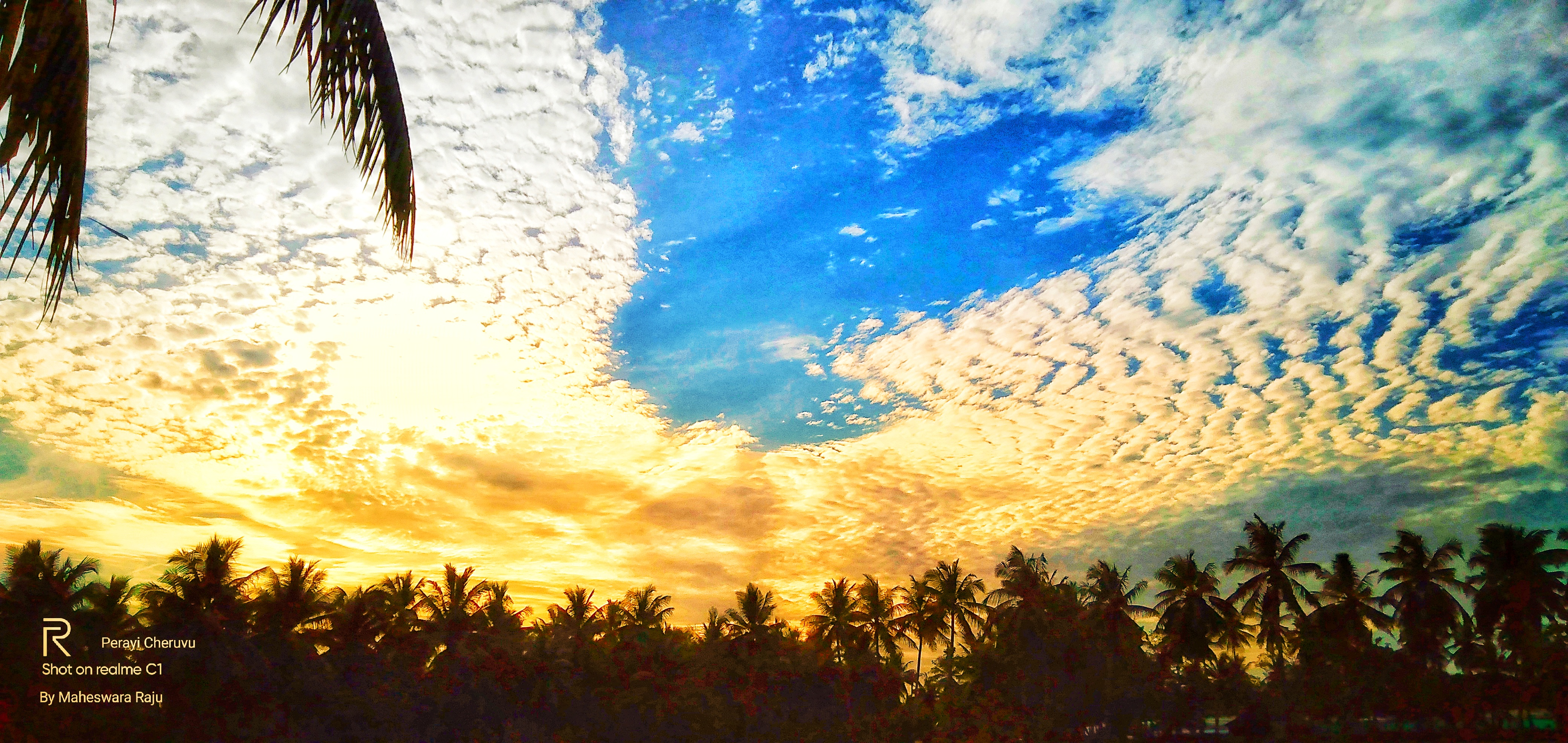 కోనసీమ